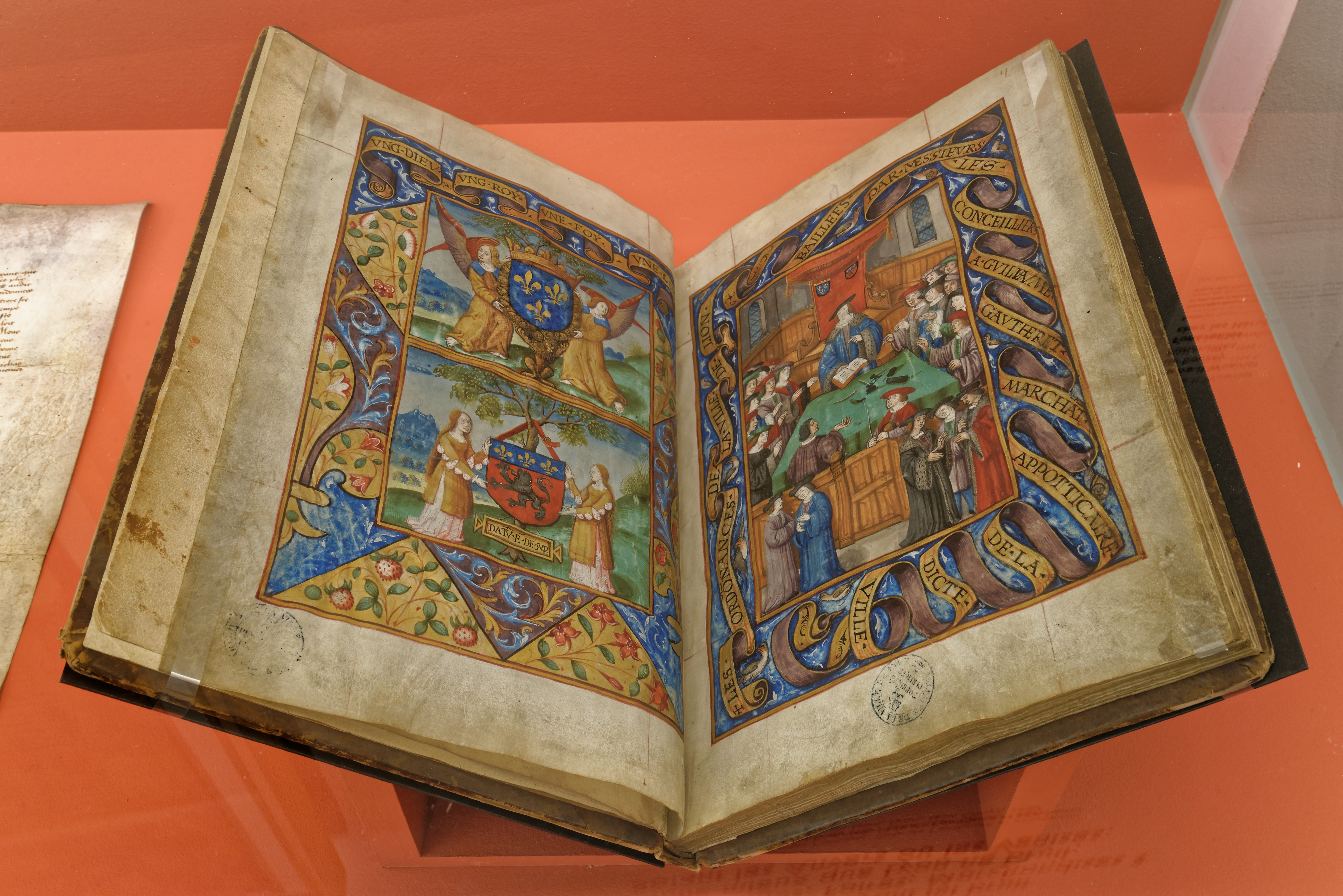 Exposition Lyon Renaissance. Arts et humanisme. Cat. 9. Pages du Garbeau de l'Épicerie, 1519. Illustrations gouache et or sur parchemin de Guillaume II Le Roy, à gauche, armes du royaume de Grance, armes de Lyon; à droite, séance du consulat de Lyon